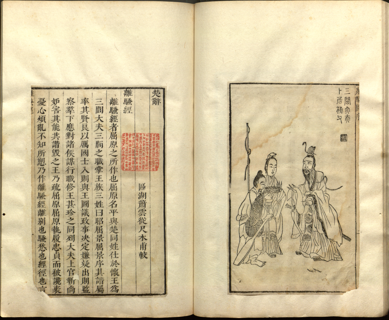 Qu Yuan interrogeant un pêcheur. Édition du Li sao de Qu Yuan, illustrée par Xiao Yuncong (1596-1673), gravée par Tang Yongxian.